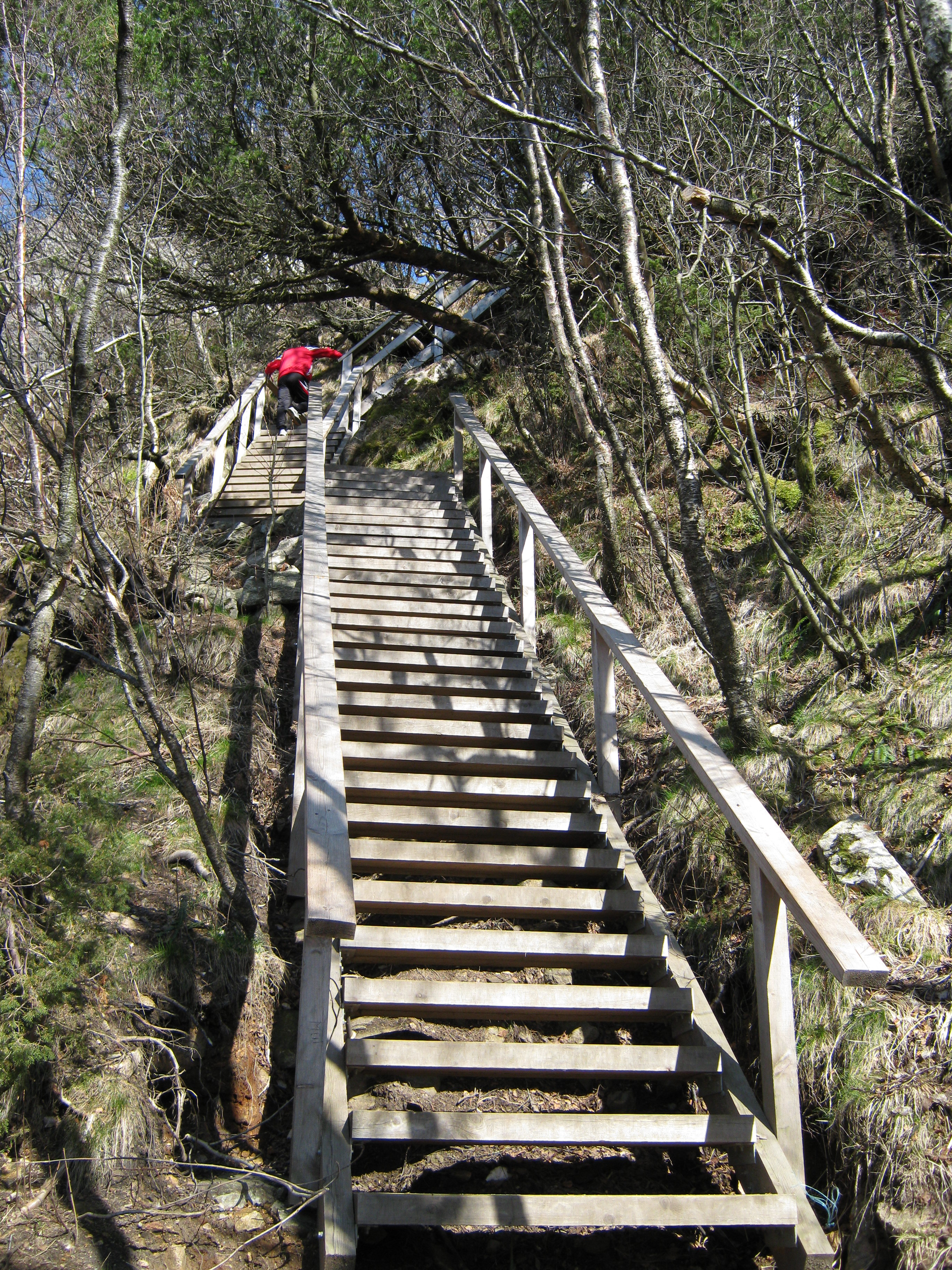 Stoltzekleiven. Tretrapper det siste stykket.